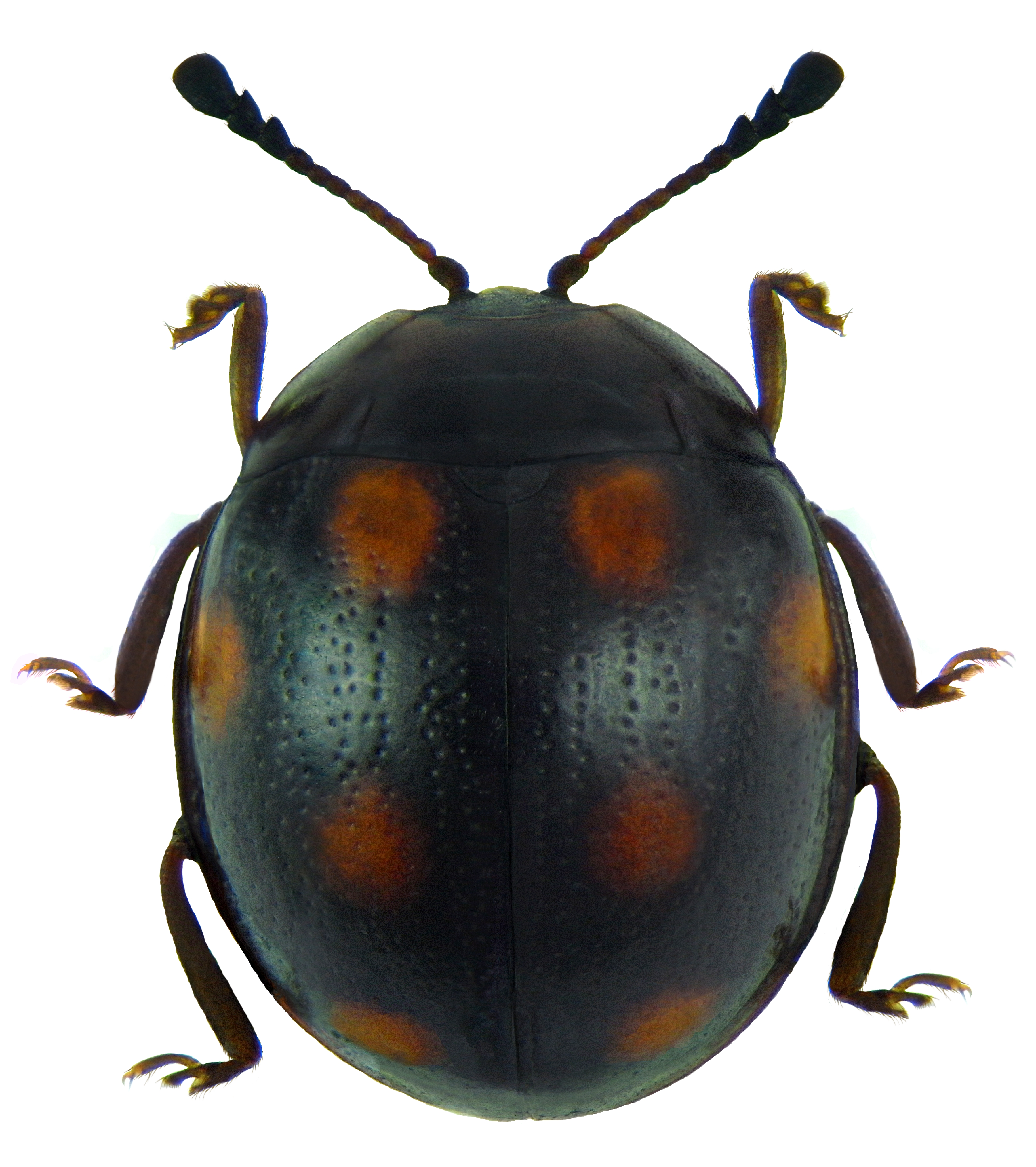 Beccariola wallacei Arrow, 1943 Familie: Endomychidae Groesse: 5,0 mm Fundort: Indonesien, Aru-Island, Warmar-Isl., Dobo leg. det. A.Skale, 2011 Photo: U.Schmidt, 2011